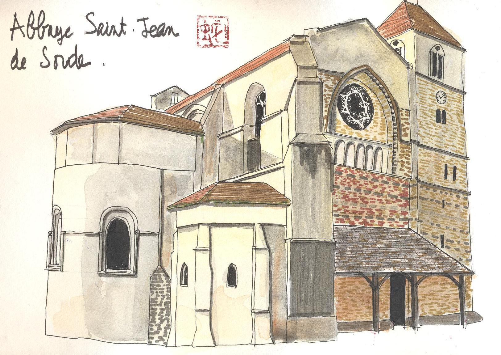 Aquarelle de l'abbaye Saint-Jean, commune de Sorde-l'Abbaye dans le département français des Landes.